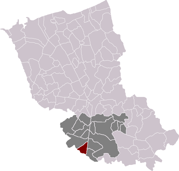 Locatie gemeente Boezegem in arrondissement Duinkerke. Zelfgemaakt. Location of Boëseghem municipality in the arrondissement of Dunkirk. Self made. Localisation de la commune de Boëseghem dans l'arrondissement de Dunkerque. Fait moi-même.